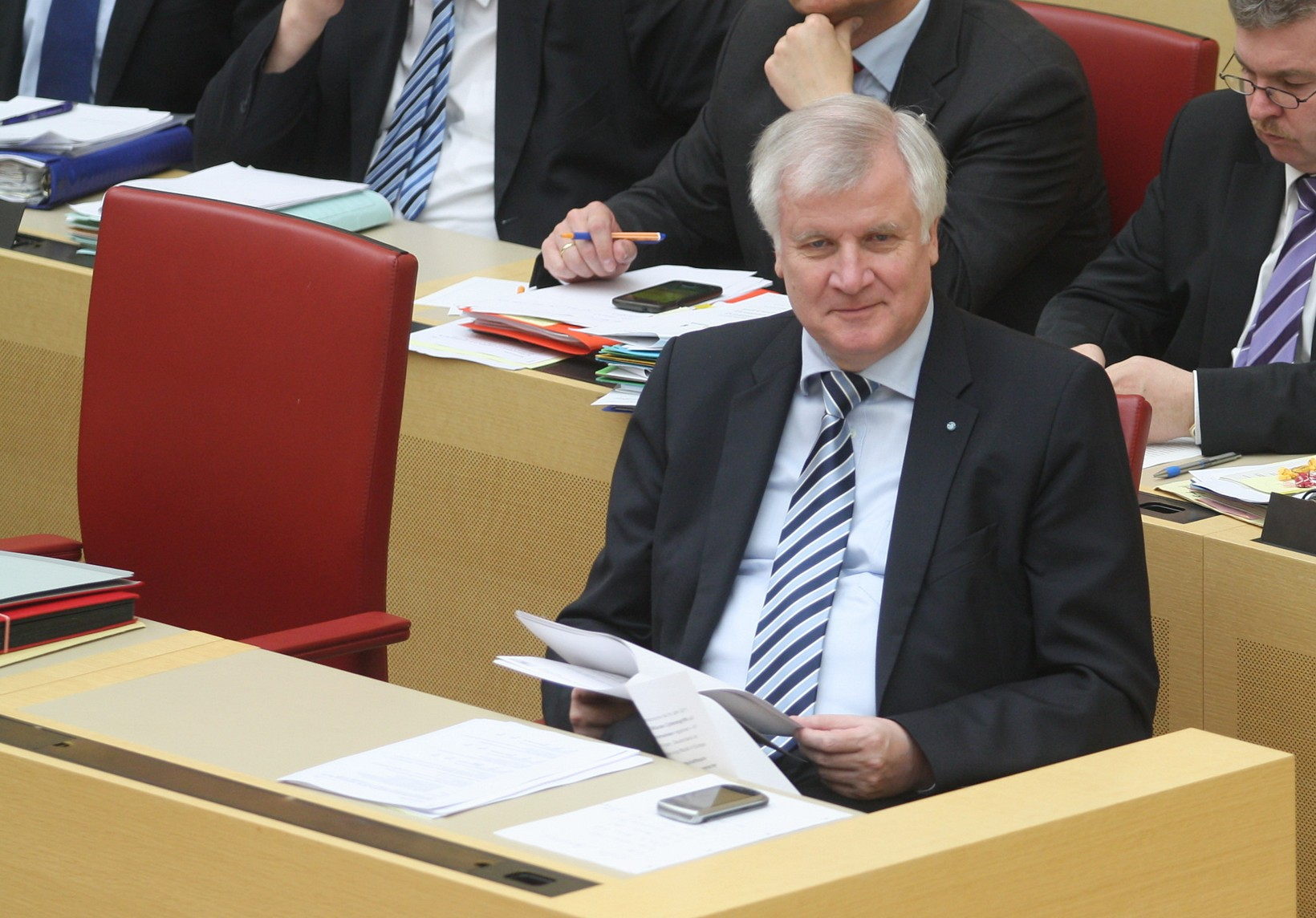 Der Bayerische Ministerpräsident Horst Seehofer am 11. April 2013 auf seinem Platz auf der Regierungsbank im Bayerischen Landtag (Plenarsaal). Titel des Werks: "Horst Seehofer im Bayerischen Landtag (2013)"